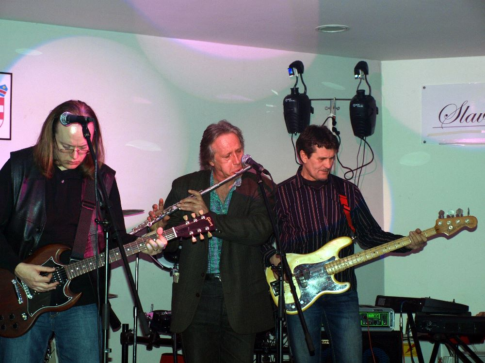 Sastav Drugi način u Slavonskom Brodu (Branko Požgajec u sredini).